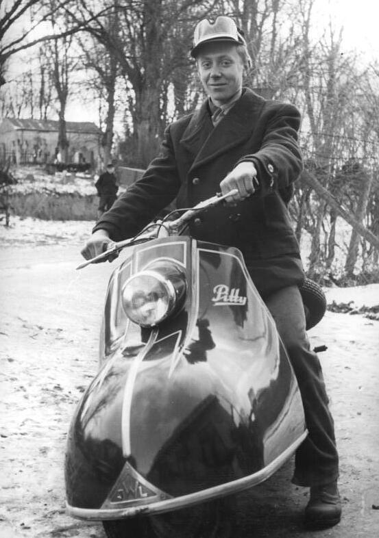 Schlage, Einzelbauer mit Motorroller Zentralbild Bez. Red. Rostock--Löwe Ms-Qu-9.1.1956 Vom wachsenden Wohlstand auf dem Lande-Durch die Agrarpolitik unserer Regierung wächst der Wohlstand für die Werktätigen auf dem Lande ständig. So haben sich in einer Zeit, in der sich die Schuldenlast der westdeutschen Bauern auf über acht Milliarden Mark erhöht hat, die Einnahmen der Bauern in unserer Republik mehr als verdreifacht. Mit den Beschlüssen über die Abschaffung des Viehhaltungsplanes und der neuen Regelung der Preise für die Erzeugnisse der Erfassung und des Aufkaufs hat unsere Regierung das Tor zur weiteren Produktionssteigerung und zum weiteren Wohlstand der Bauern aufgestoßen. UBz: Der werktätige Einzelbauer Friedberb Böhm (Bild) und sein Vater aus Schlage, Krs. Rostock-Land, haben im Jahre 1955 dreizehn Schweine dem freien Aufkauf geliefert. Für das Geld konnten sie sich u. a. einen Pitty-Motorroller aus dem Konsum-Landwarenhaus Kavelstorf kaufen. Bauer Böhm jun. sagt: "Es ist für mich eine Selbstverständlichkeit, im Jahre 1956 wieder einige Schweine dem freien Aufkauf zur Verfügung zu stellen. Ich begrüße die neuen Maßnahmen und werde alle Kräfte einsetzen, um meine Erträge im Stall und auf dem Feld zu erhöhen.